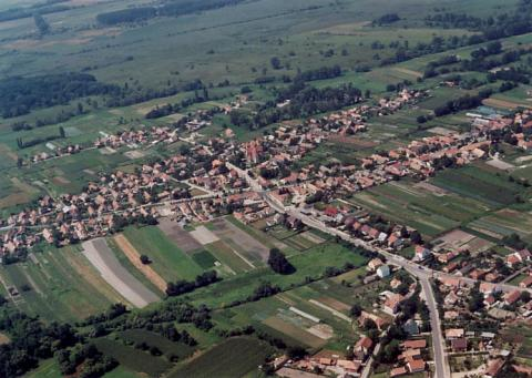 Ócsa, Hungary, aerialphotography